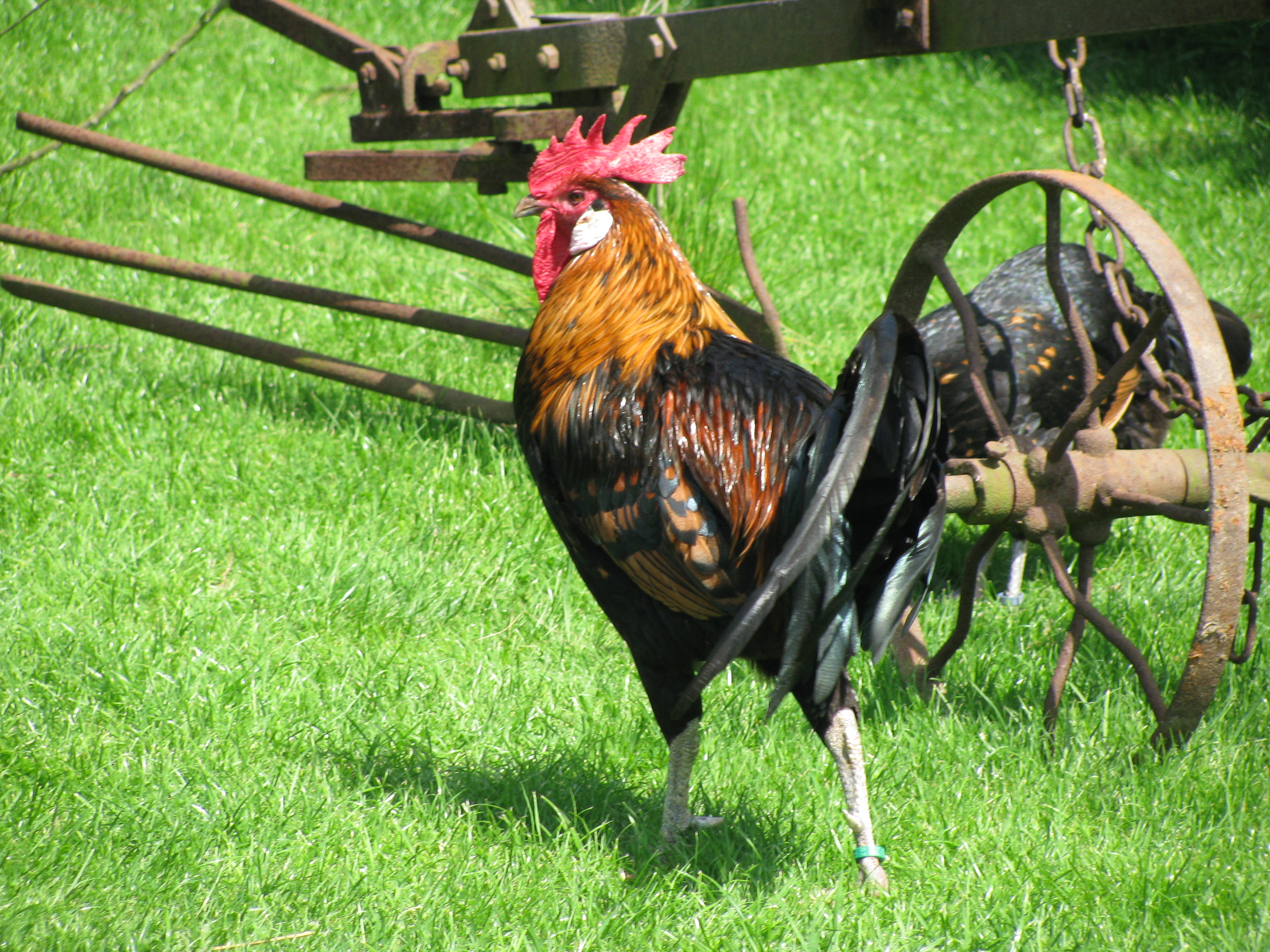 Hahn der Rasse Bergische Kräher, aufgenommen im Wissenschaftlichen Geflügelhof Sinsteden